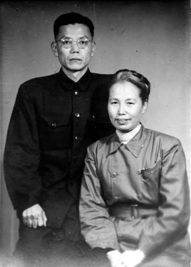 楊克煌與謝雪紅